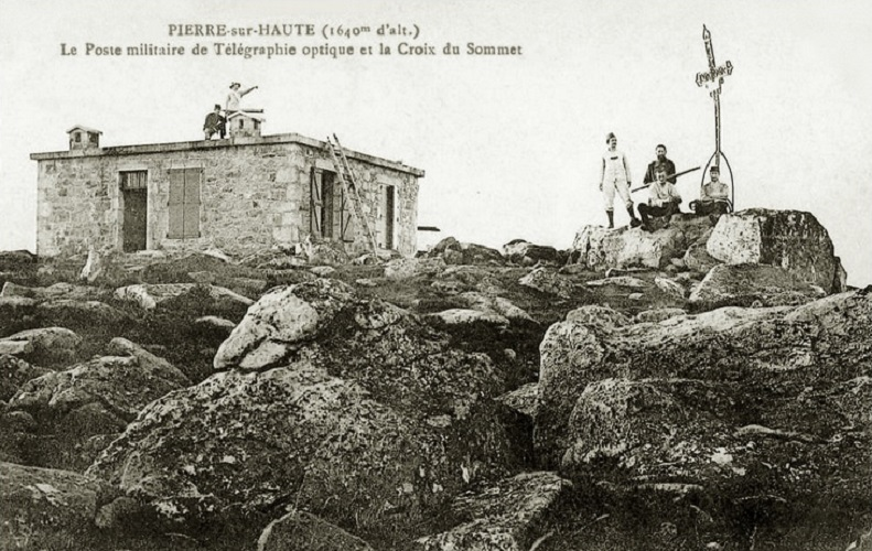 La station militaire de Pierre-Sur-Haute vers 1920.